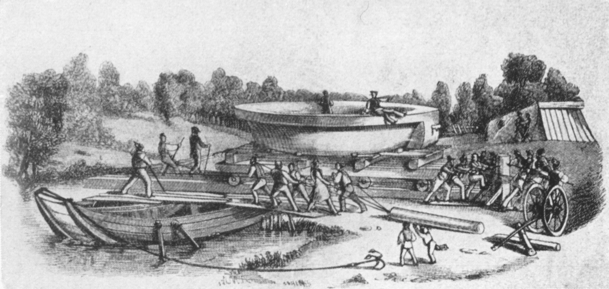 Die aus dem großen Markgrafenstein verfertigte Schale wird zum Transport nach Berlin verladen (1828).